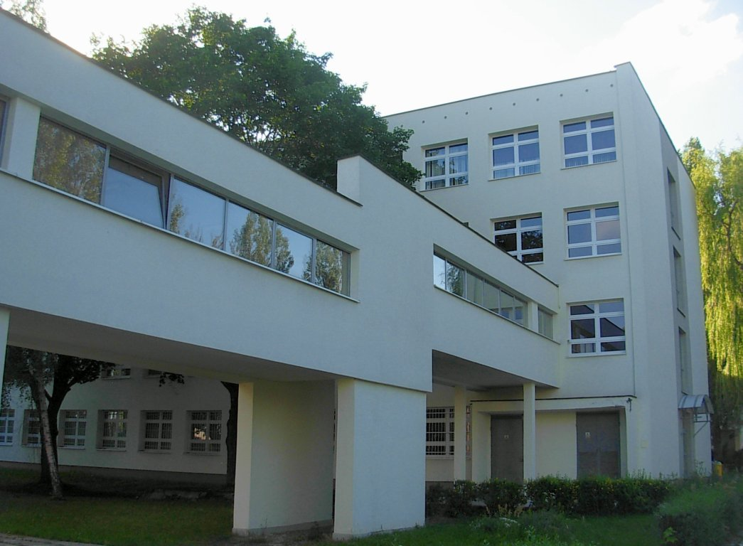 Uniwersytet Technologiczno-Przyrodniczy w Bydgoszczy